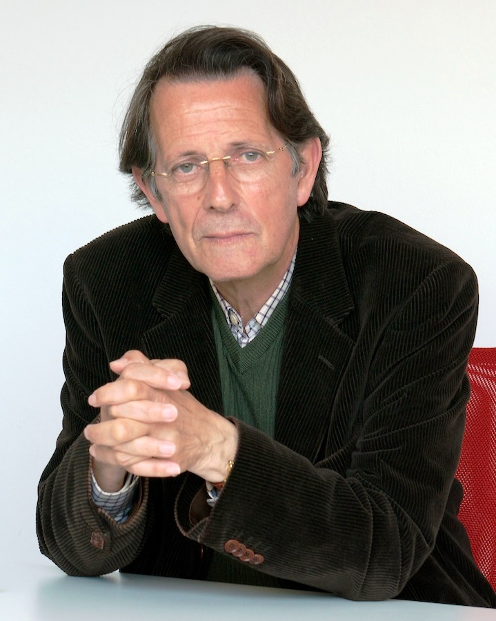 Francisco Pillado Maior, nado na Coruña en 1941, é un escritor e persoeiro do mundo do teatro galego